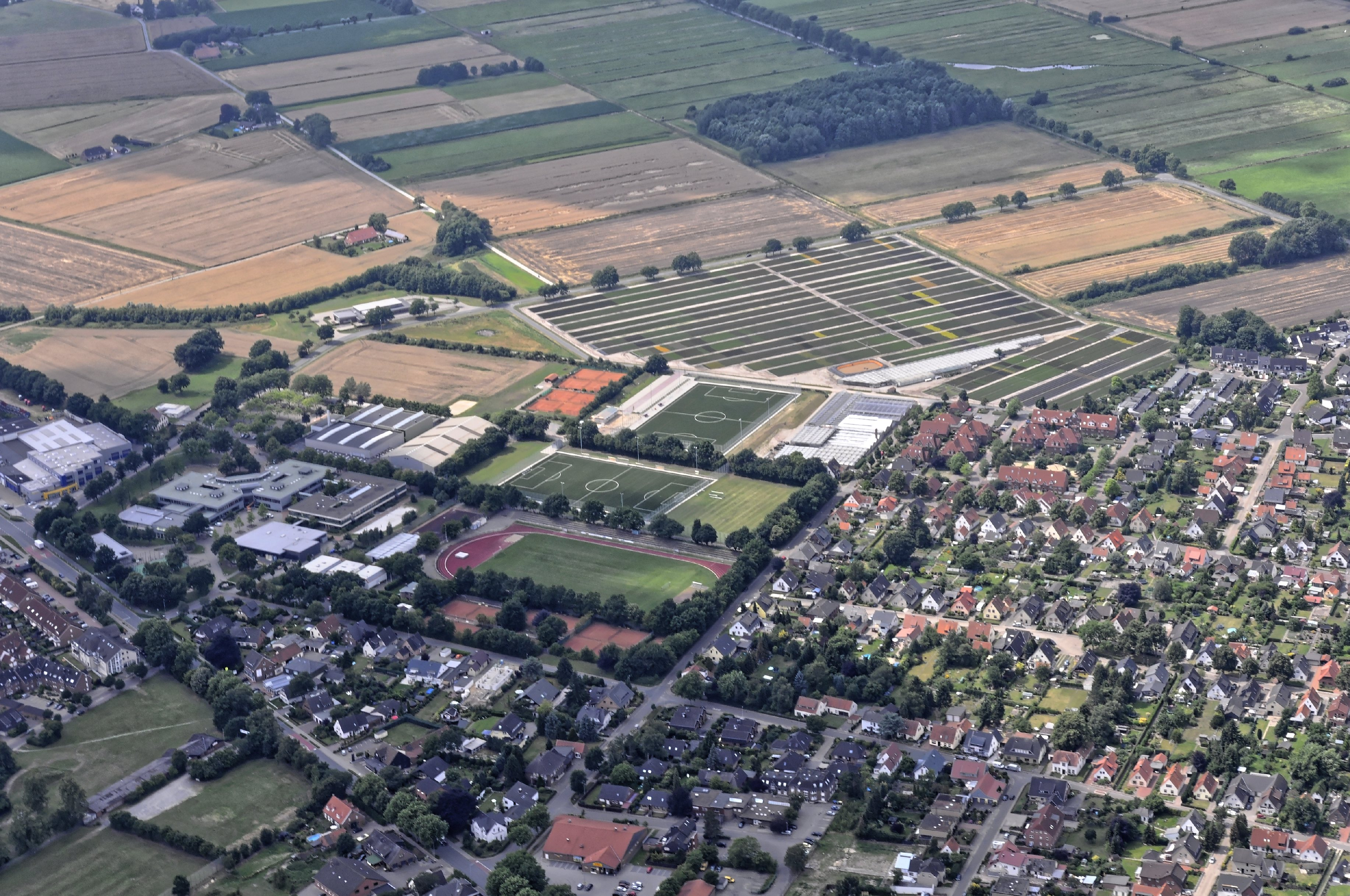 Bilder vom Flug Nordholz-Hammelburg 2015: Blick von Osten auf die Kooperative Gesamtschule (links) und dnm Sportplatz von Brinkum.